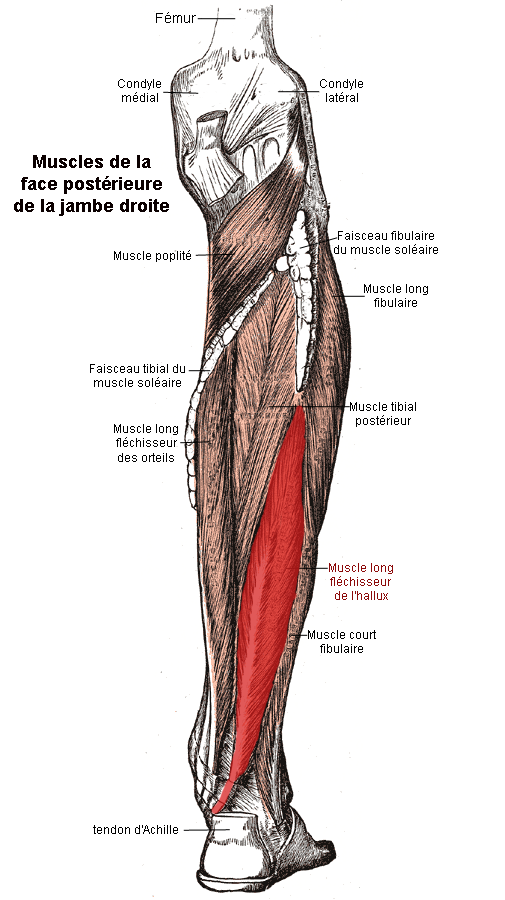 Le mucle long fléchisseur de l'hallux. Anatomie humaine